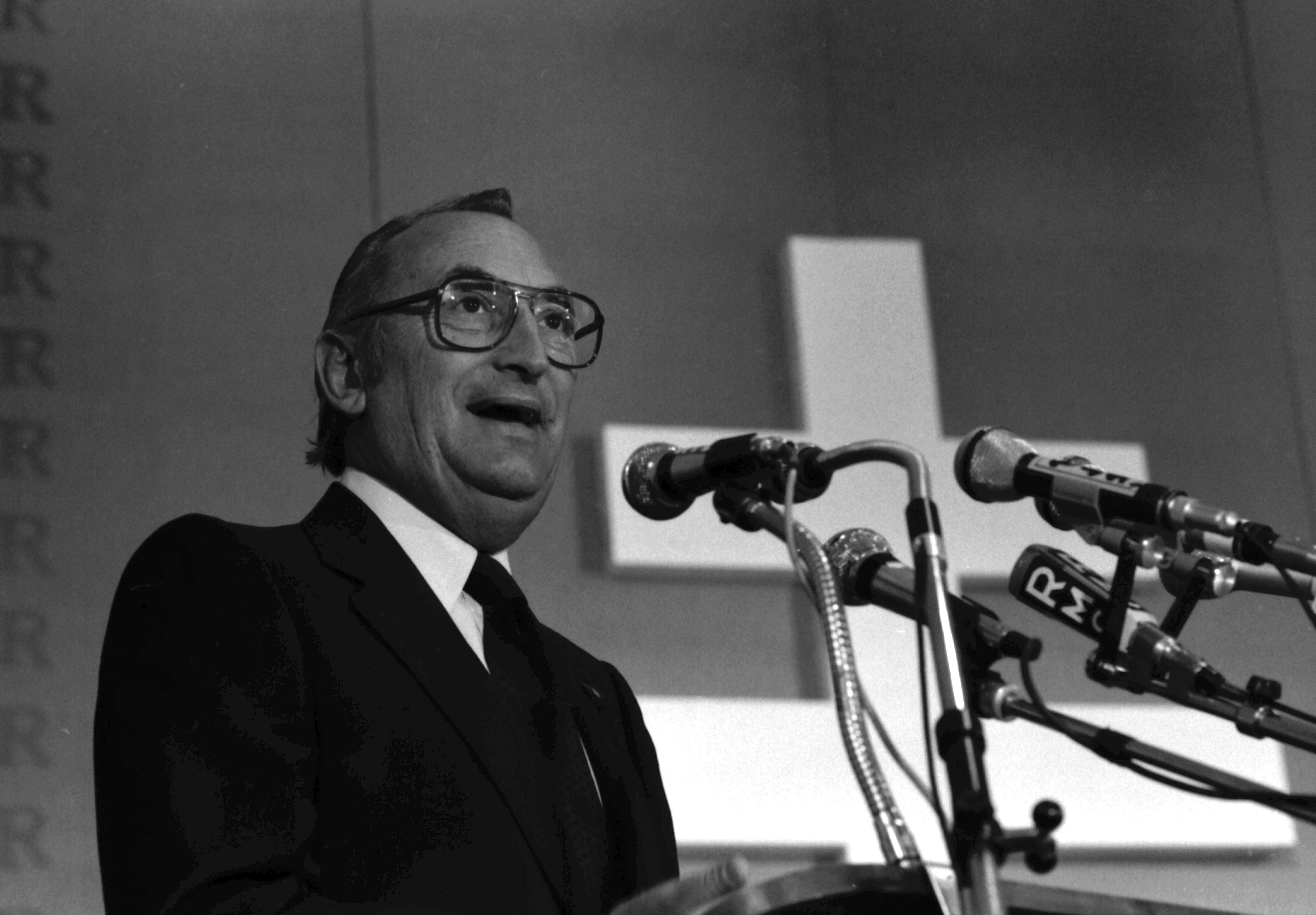 André Bord aux journées parlementaires du RPR le 29 septembre 1980